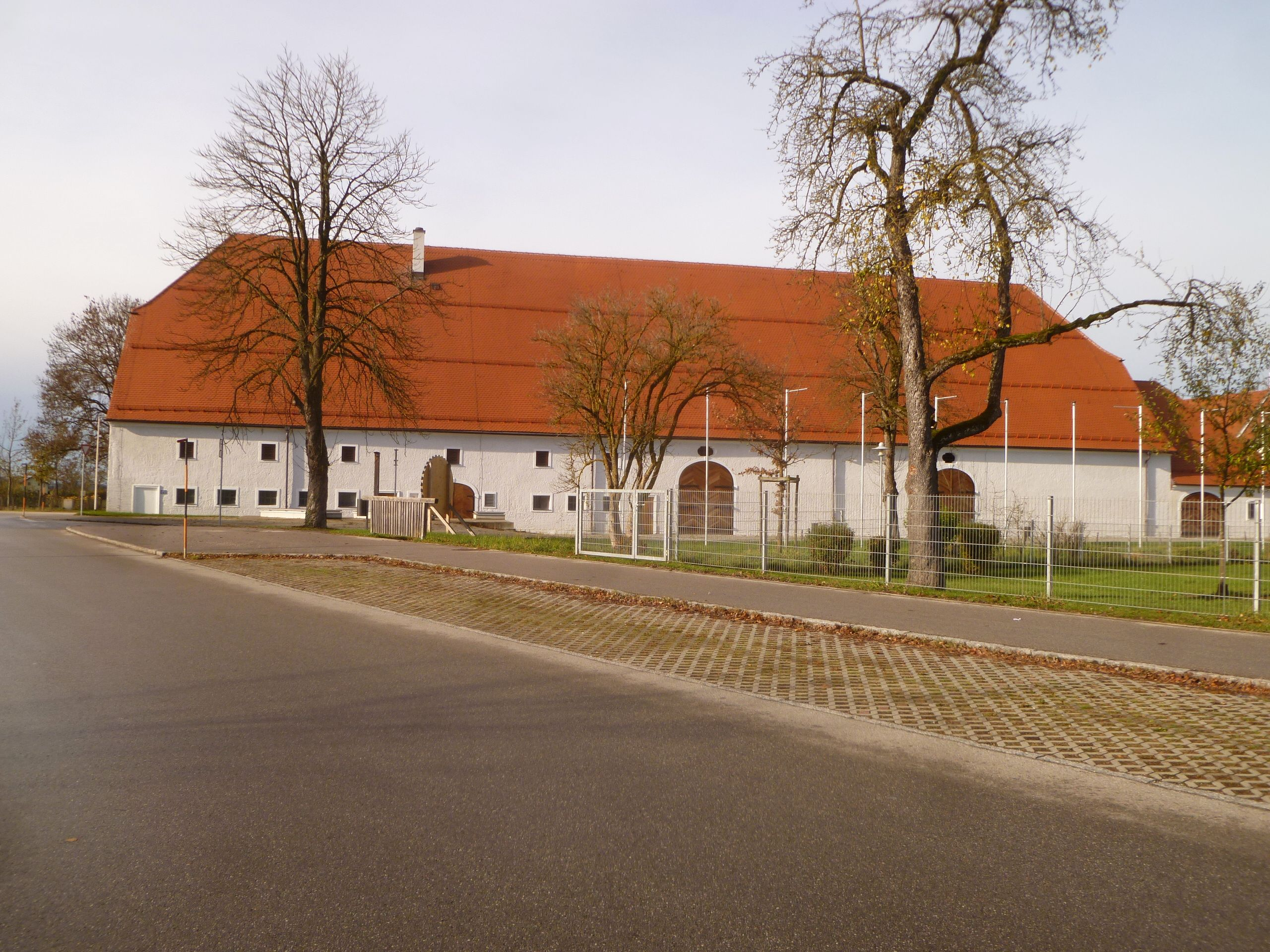 Gesamtanlage des ehem. Augustiner-Chorherrenklosters Ranshofen: Pfarrkirche (Stiftskirche), "Schlössl" (Klostertrakte), Meierhof, Friedhof mit Karner, Einfriedungsmauern mit Portalanlagen, Gartenbaudenkmale im ehem. Konventgarten; Reste von Vorgängerbauten